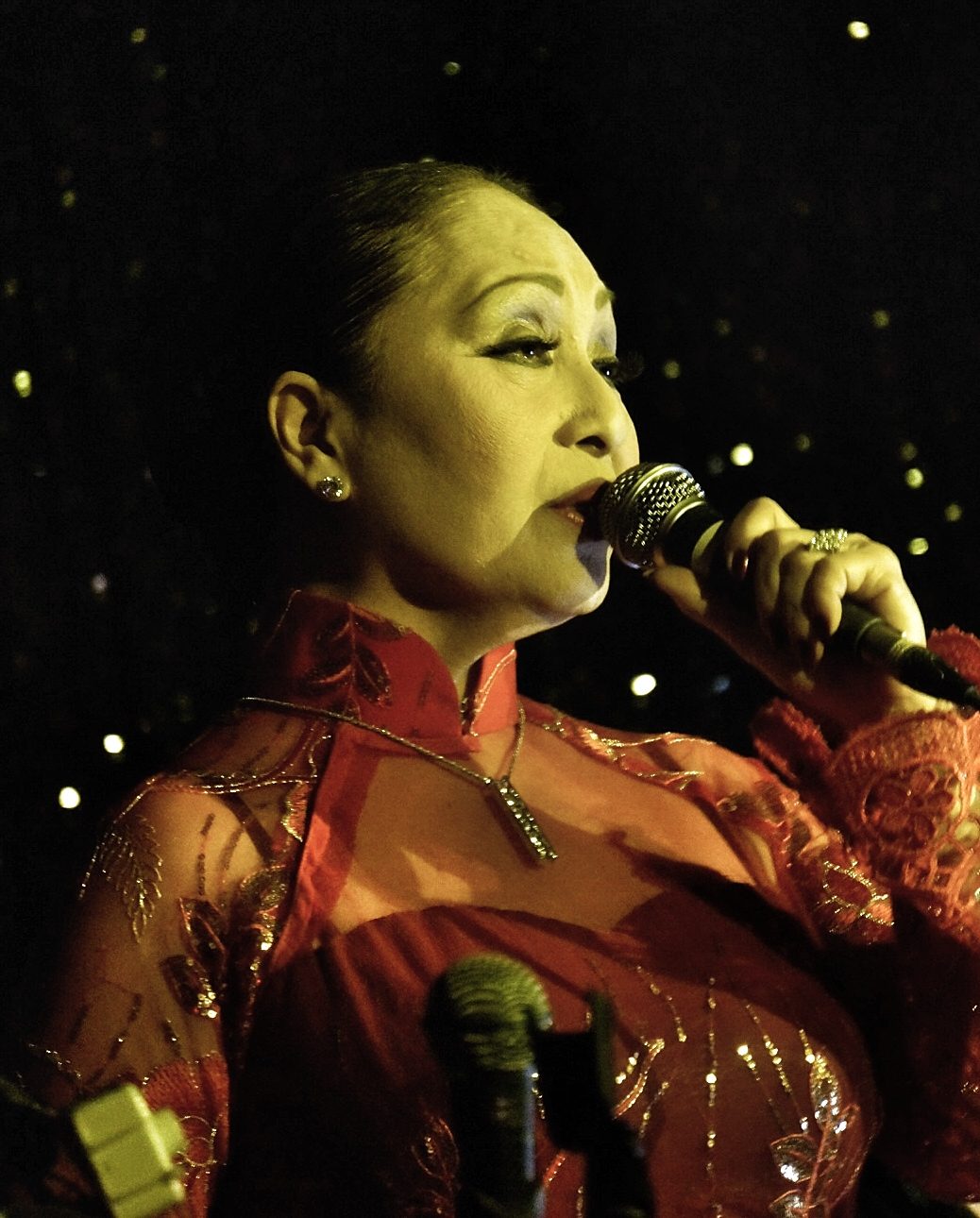 Ca sĩ Lan Ngọc tại phòng Trà Ân Nam